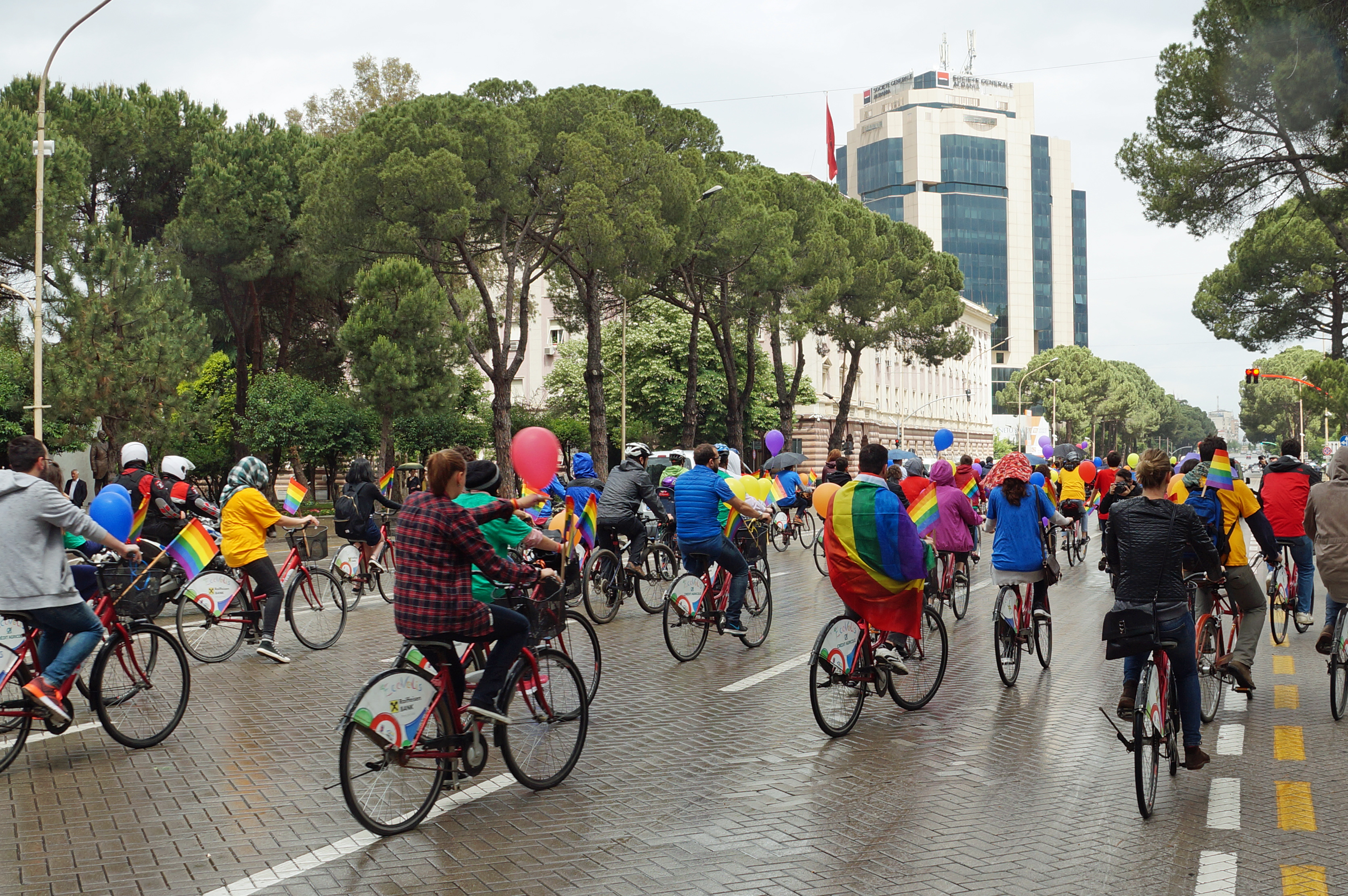 Tirana Gay (P)Ride 2016